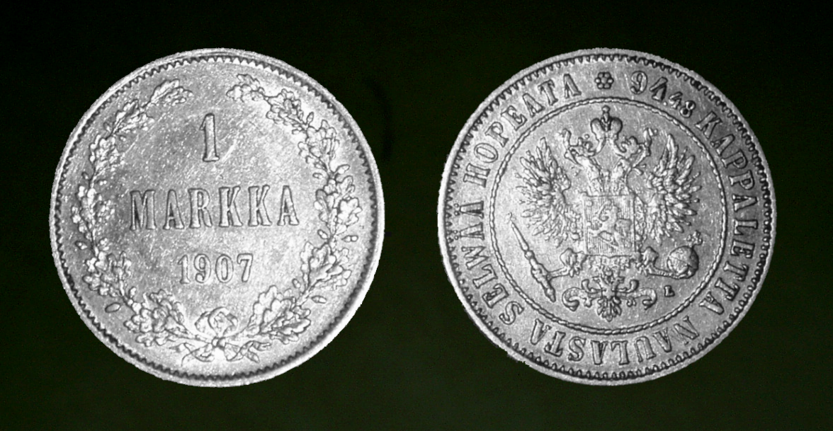 Finnish Markka 1864-1915, taken by user Oakokko on fi.wikipedia